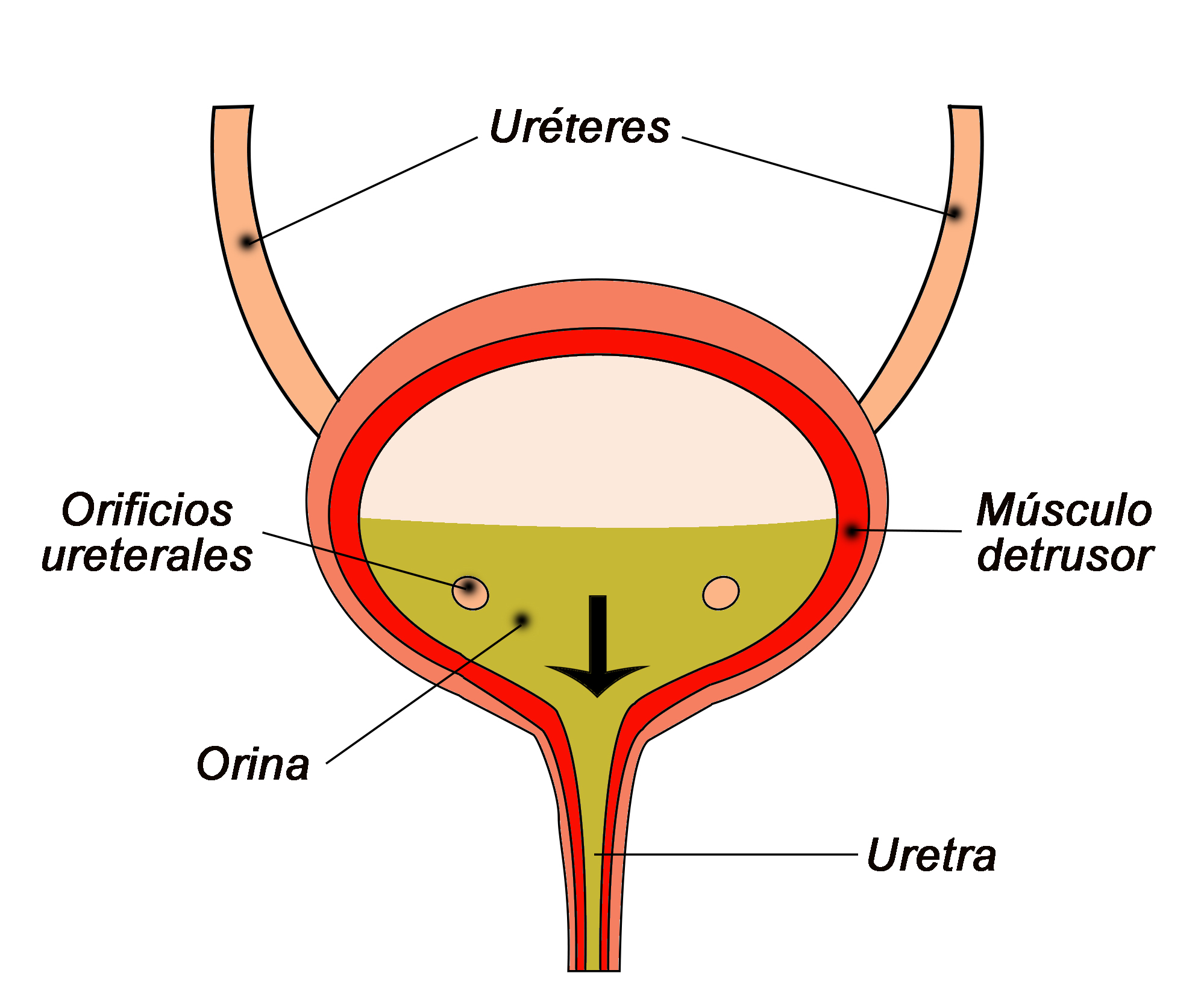 Esquema de la vejiga urinaria con rótulos en español.